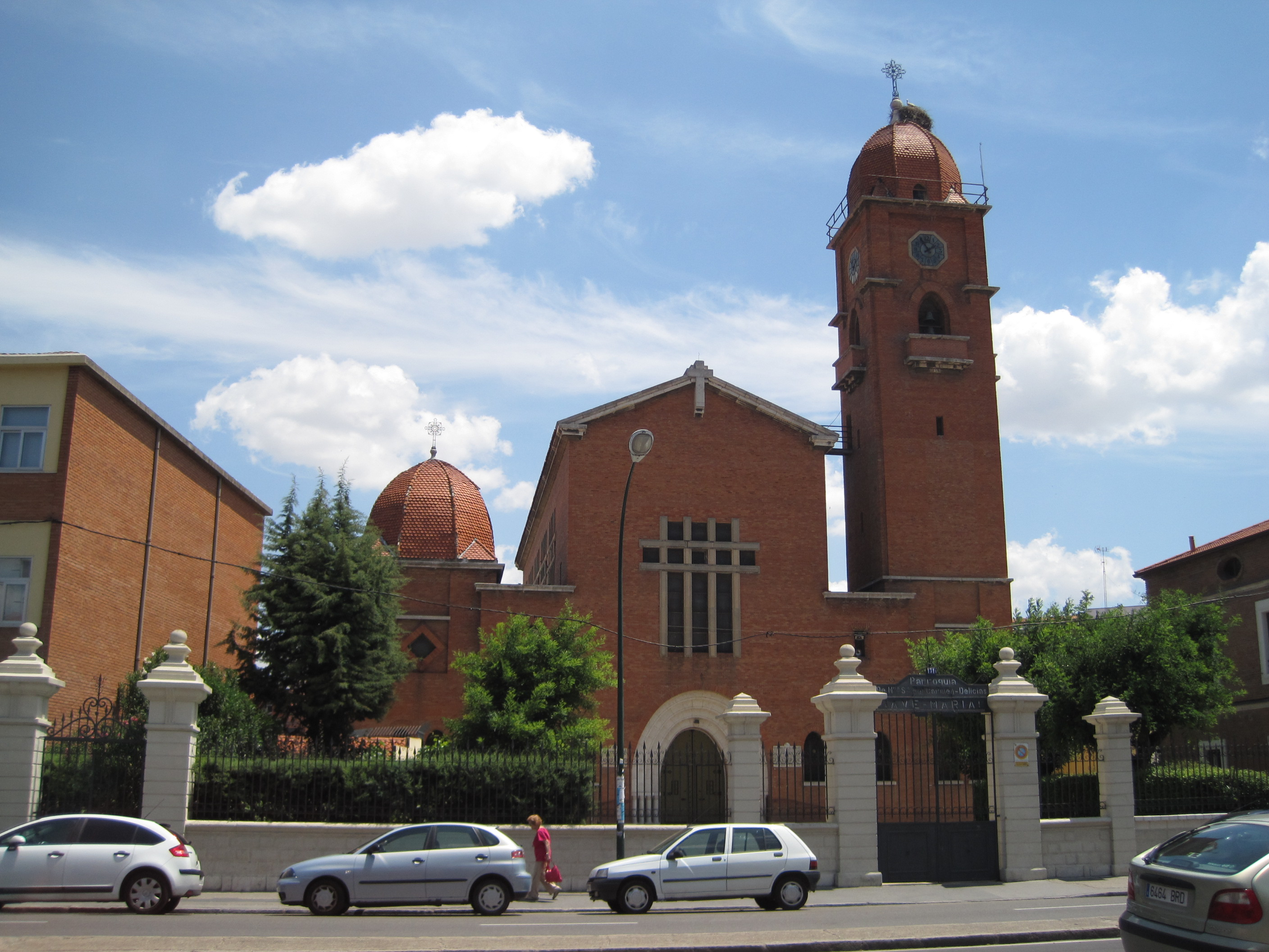 Vista de la iglesia de Nuestra Señora del Carmen, en el barrio de Delicias (Valladolid, España).